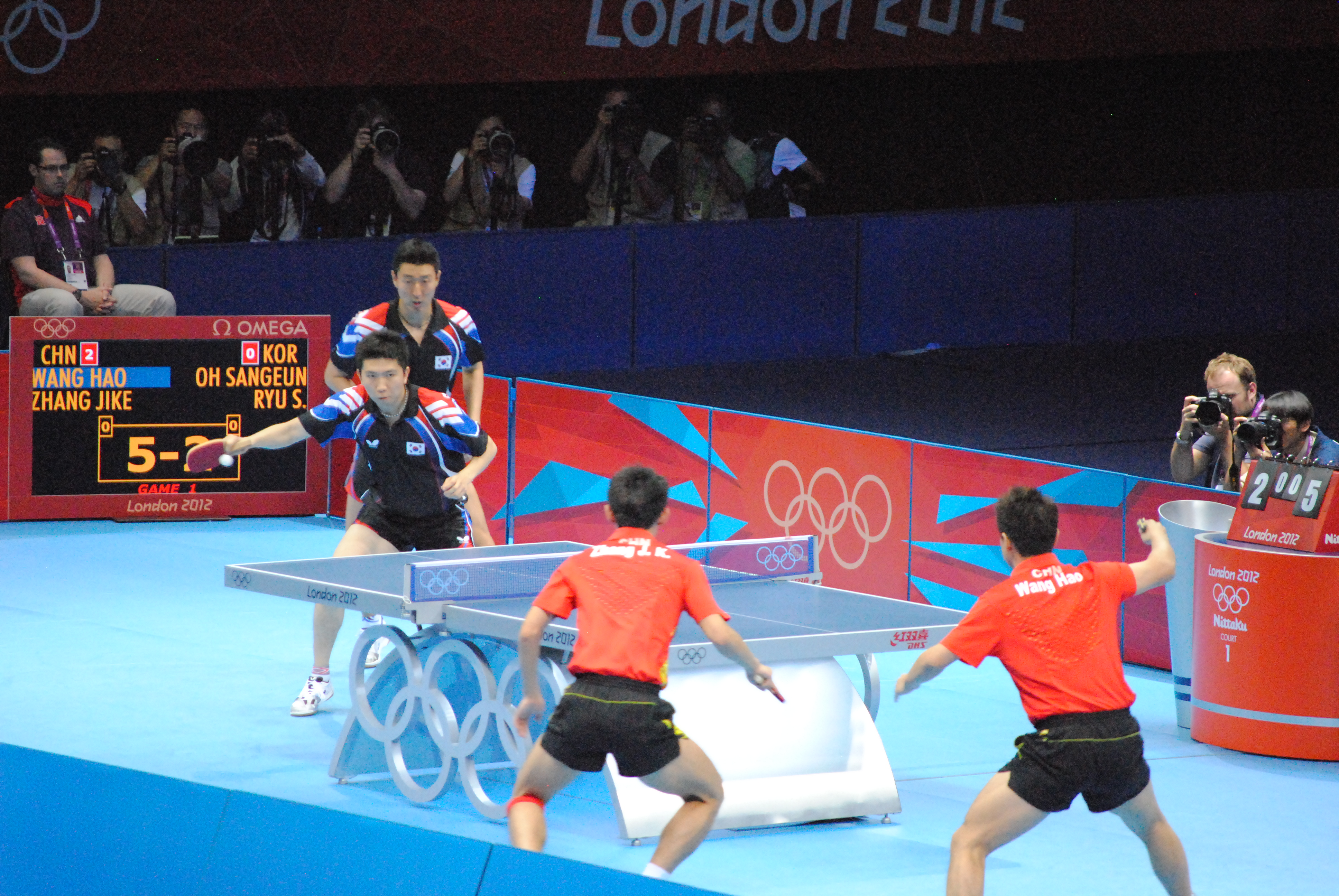 ExCel Arena